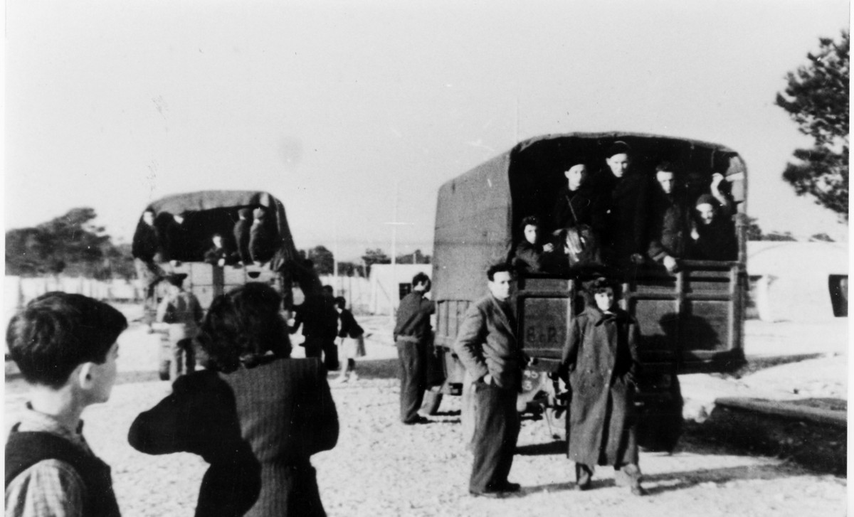 החבורה - איטליה - במשאית של הצבא הבריטי למחנות ההעפלה